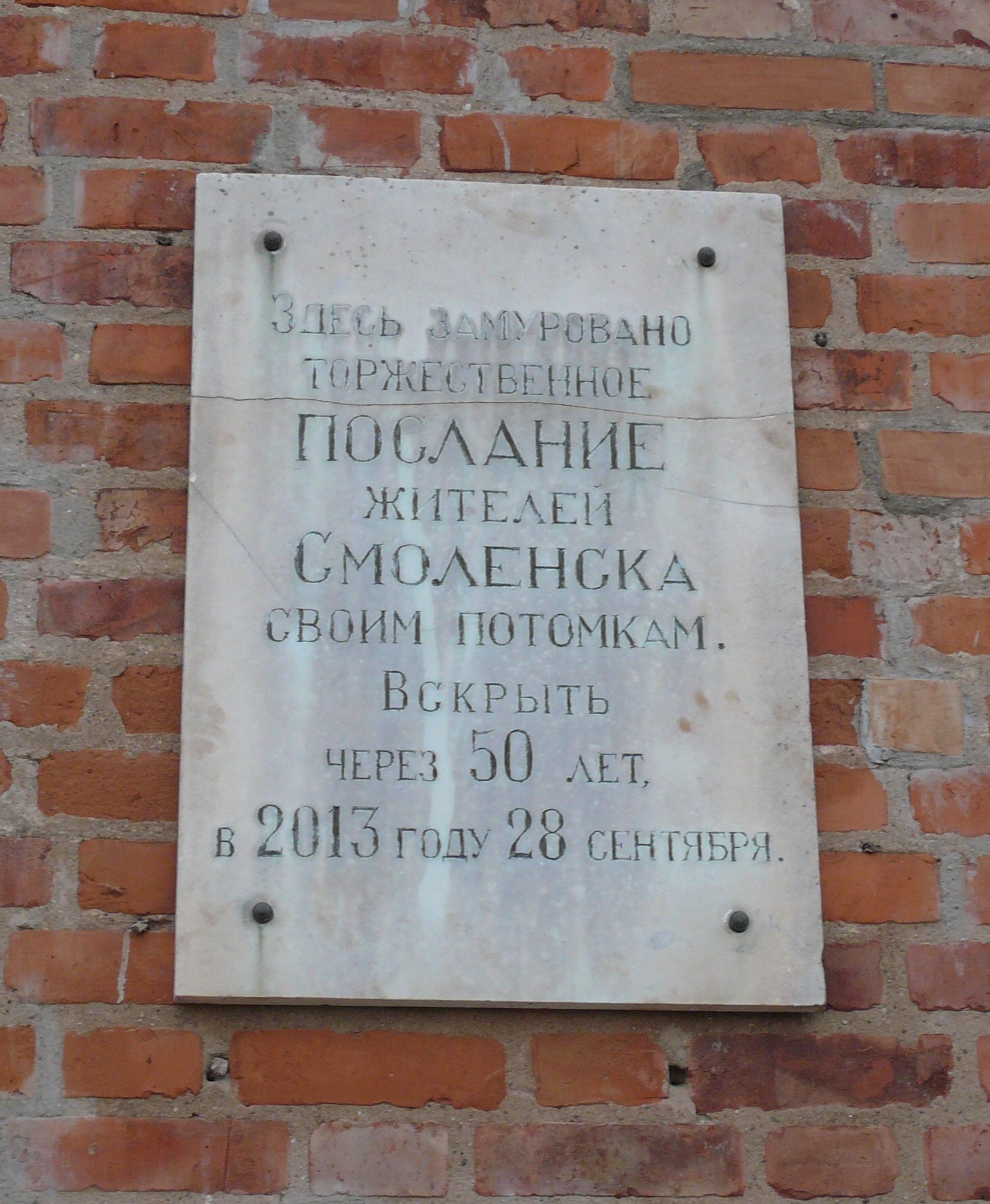 Капсула с посланием потомкам в Смоленске. Надпись: "Здесь замуровано торжественное послание жителей Смоленска своим потомкам. Вскрыть через 50 лет в 2013 году 28 сентября".